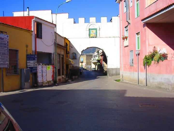 Porta civica di San Nicola a Striano nel 1997, risalente al XIV secolo